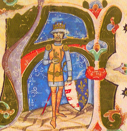 Carlos Roberto de HUngría de la Cronica Ilustrada